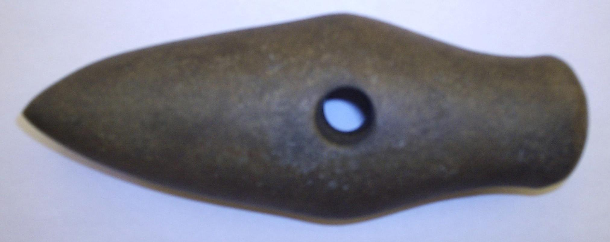 Båtyxa från Tutaryd socken i Småland, fotograferad den 18 oktober 2005 av Harri Blomberg.